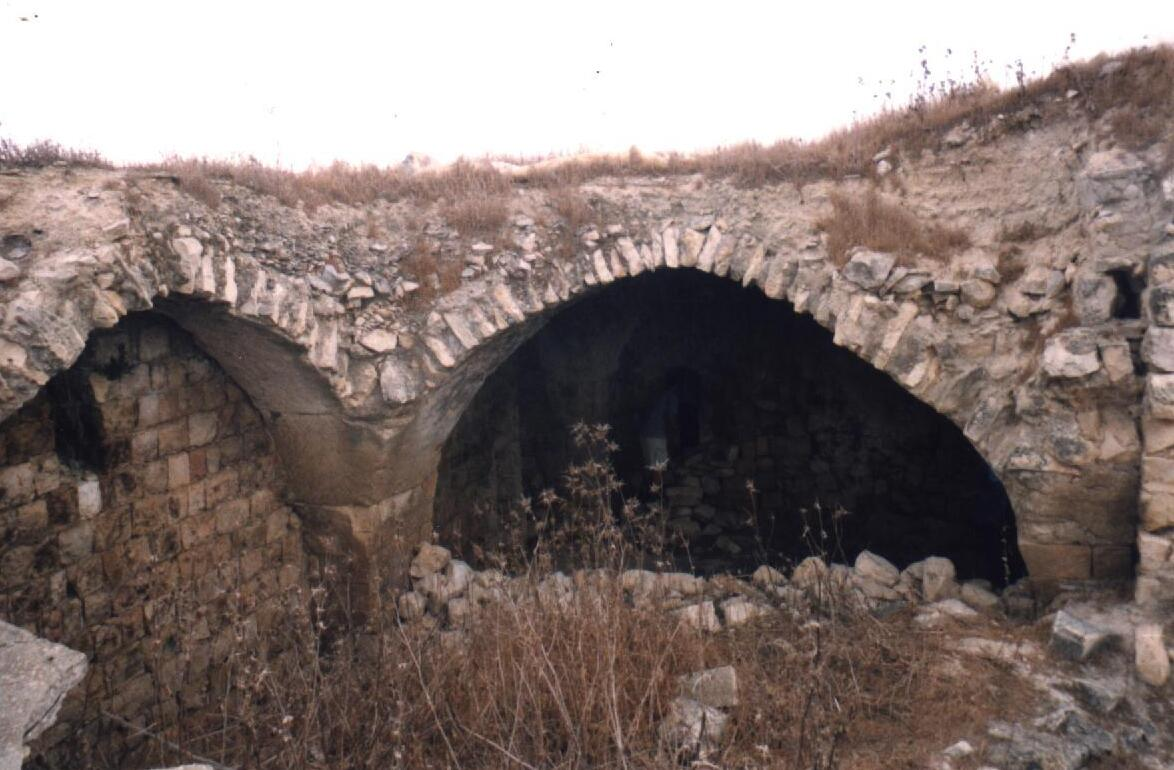 إحدى جوانب قلعة ميس المنهارة والمهملة على تخوم بلدةعبا